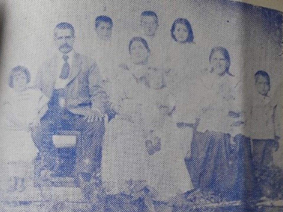 Foto familiar de Monseñor Rojas Chaparro